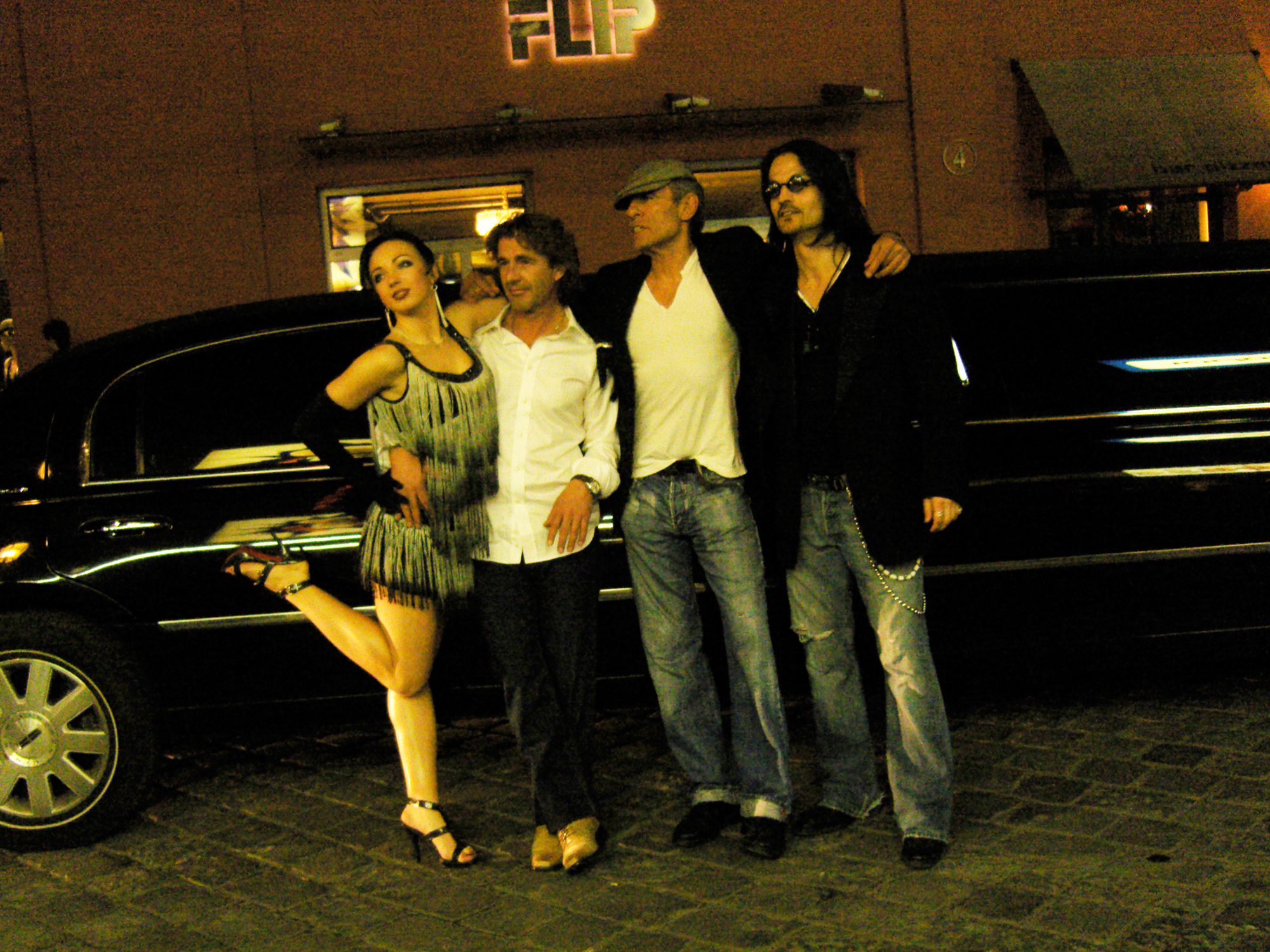 Klaus Lemke posiert 2009 anlässlich der Premiere von „Dancing with Devils“ mit Crewmitgliedern in der Feilitzschstraße. Rechts Schauspieler Brad Pessi, der im Film „Schmutziger Süden“ mitspielte.